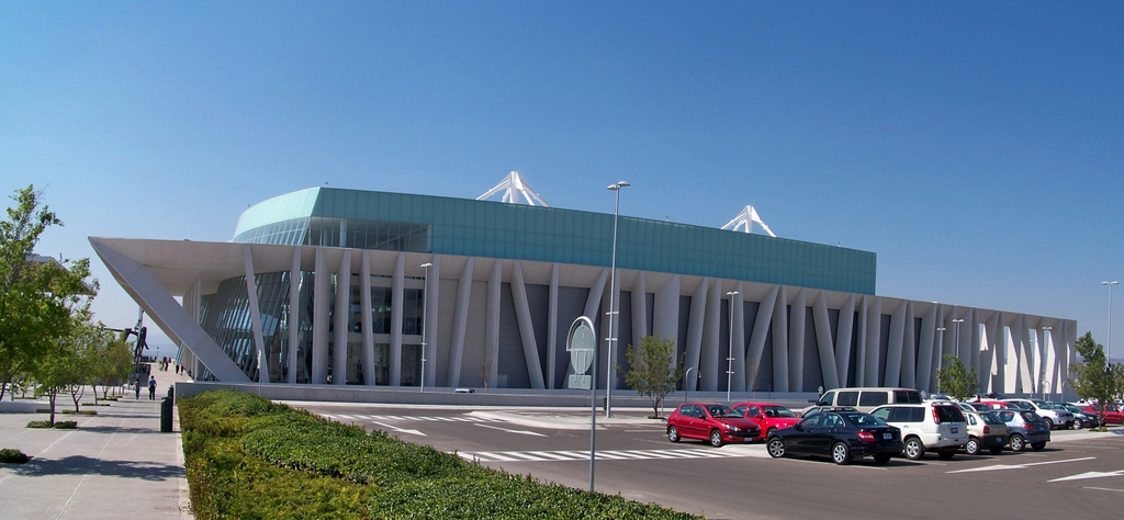 Centro de Congresos y Convenciones Querétaro